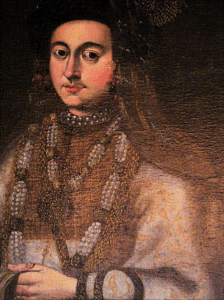 Marie Vladimirovna af Staritsa (ca. 1560 – 1610), Rosenborg Slot, København Мария Владимировна Старицкая. Портрет работы неизвестного художника XVI века из датского замка Розенборг